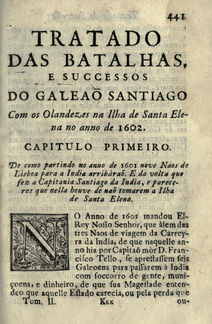 História Trágico-Marítima, Vol. II - Tratado das batalhas